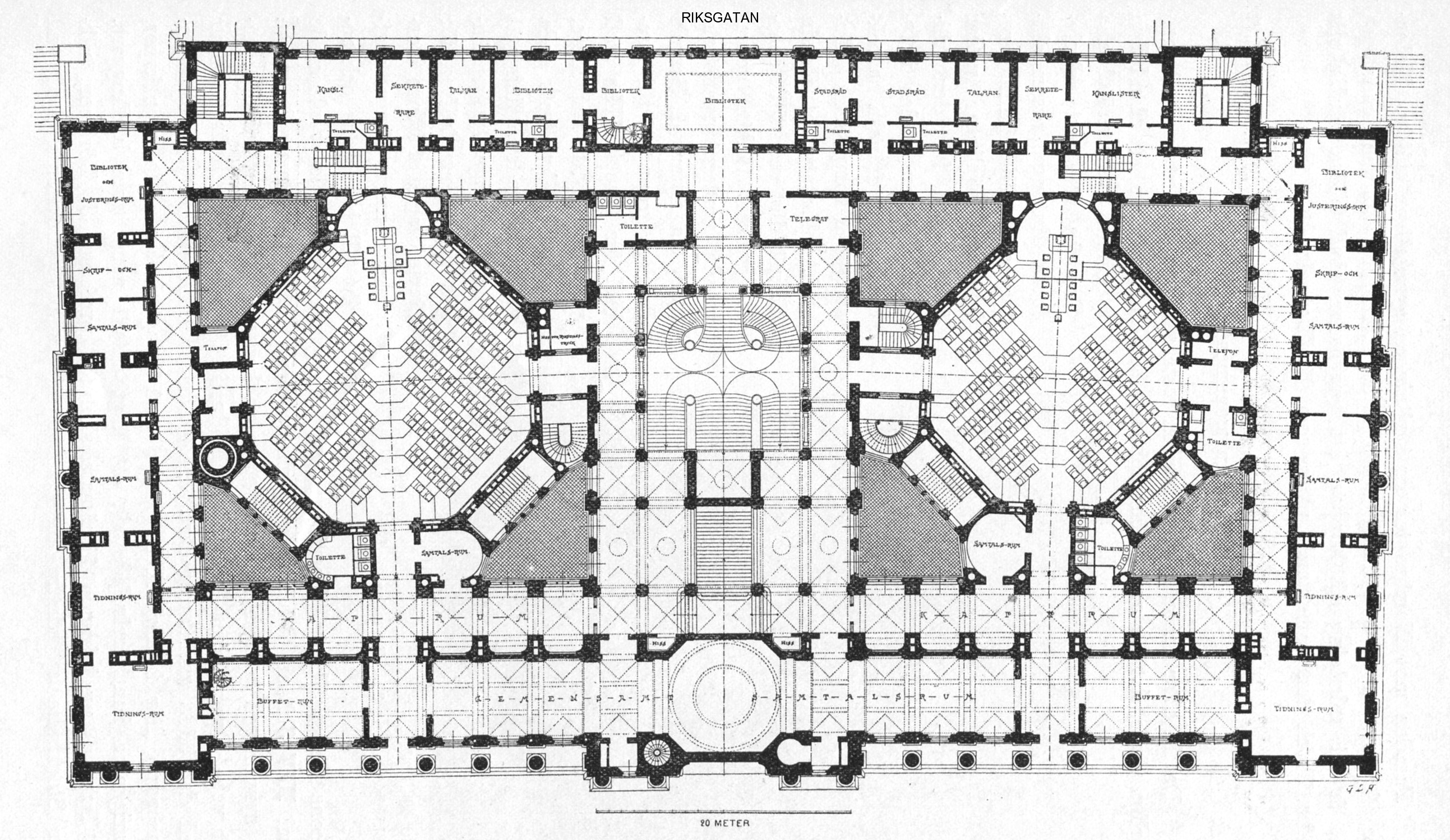 Planritning för nya Riksdagshuset på Helgeandsholmen i Stockholm